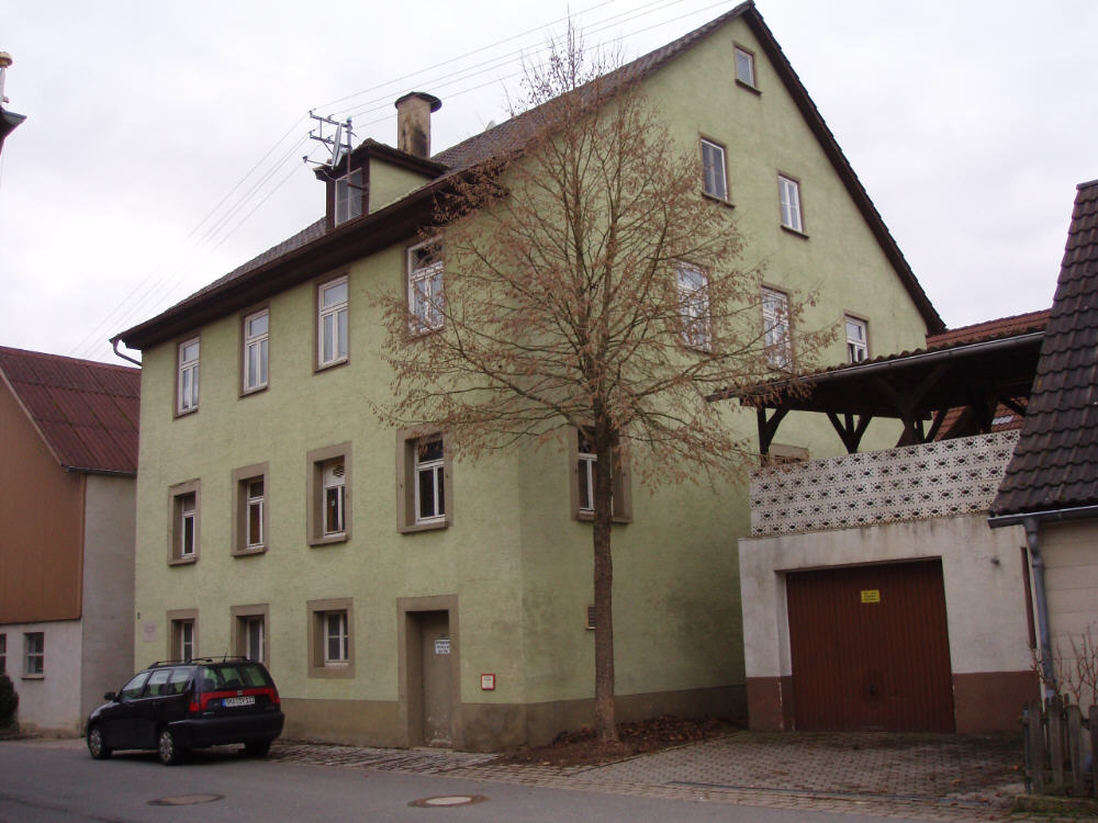 ehemalige Synagoge in Hohebach